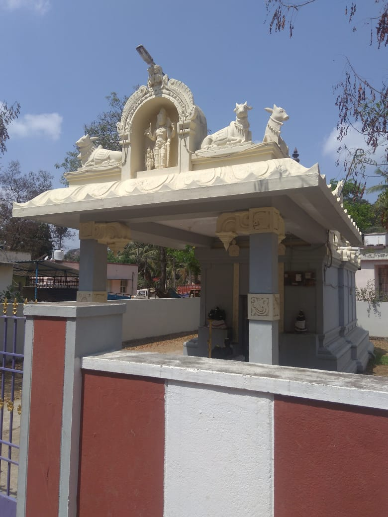 திருக்கழுக்குன்றம் வீரபத்திரர்.